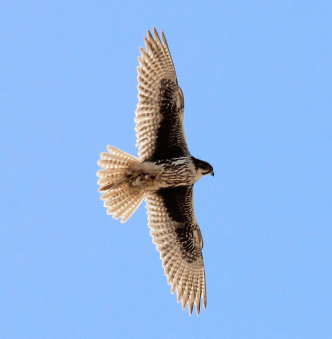 Immature Prairie Falcon